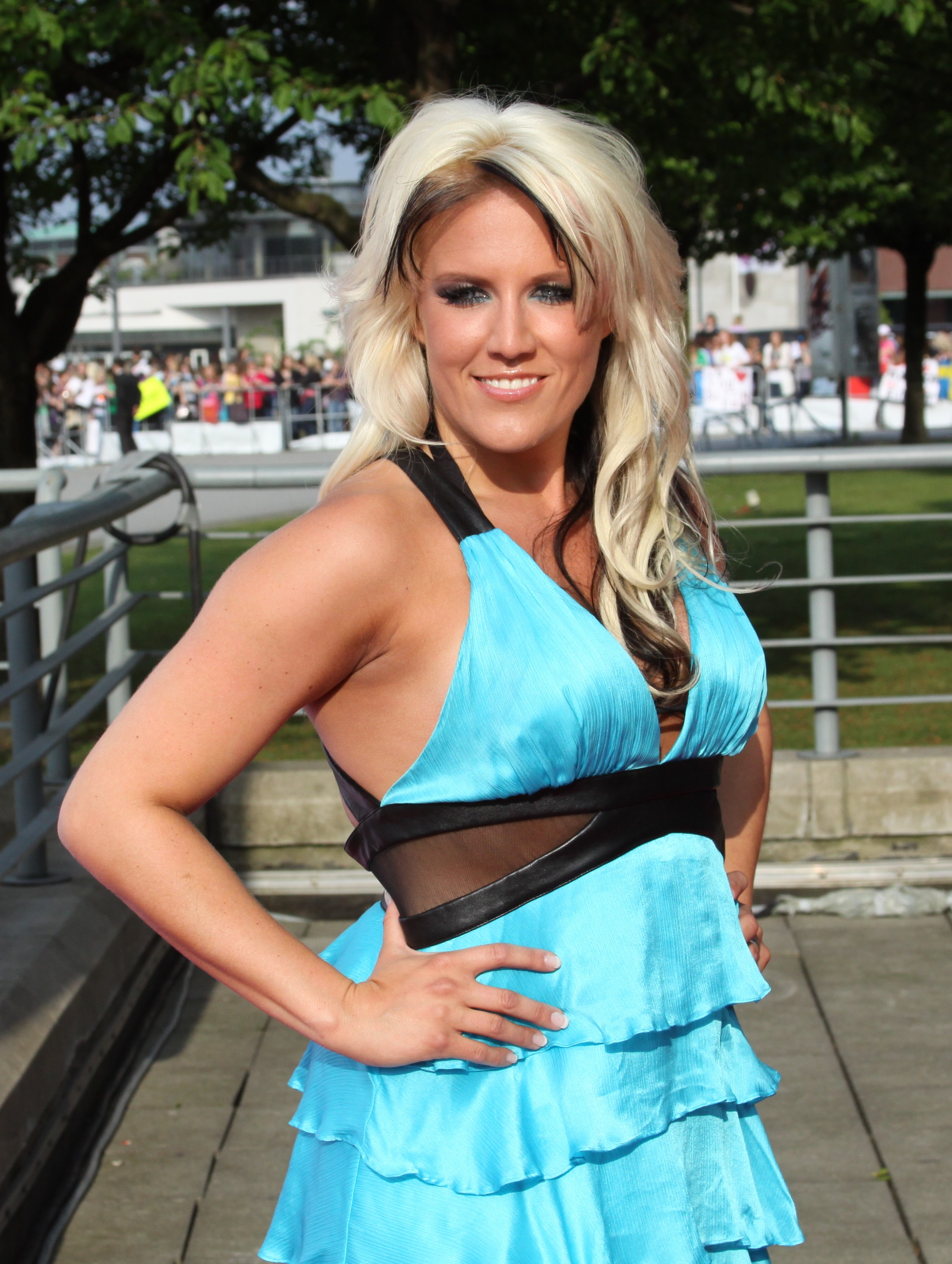 Cascada beim Viva Comet 2010 in Berlin